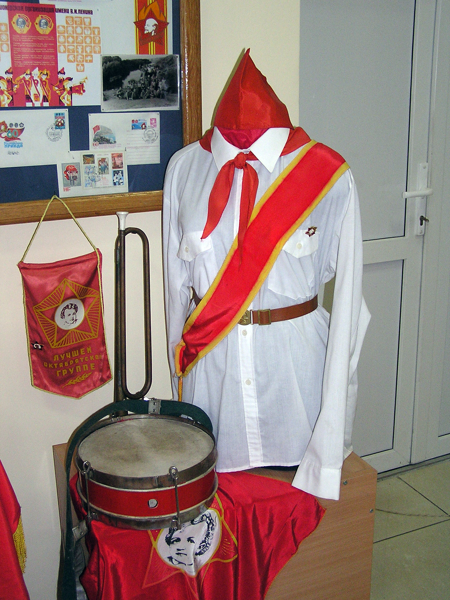 Музей истории и развития Донецкой Железной дороги. Пионерская форма